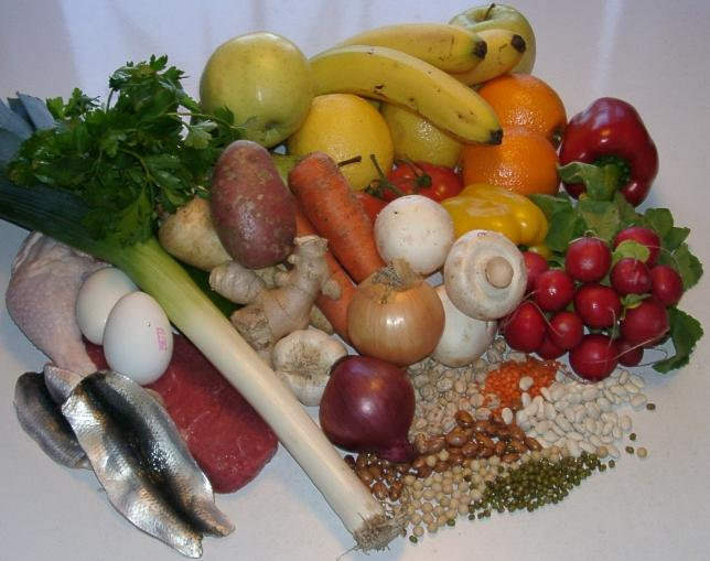 Ett litet urval av livsmedel som lämpar sig till stenålderskost. Foto: sv::Användare:Chrizz